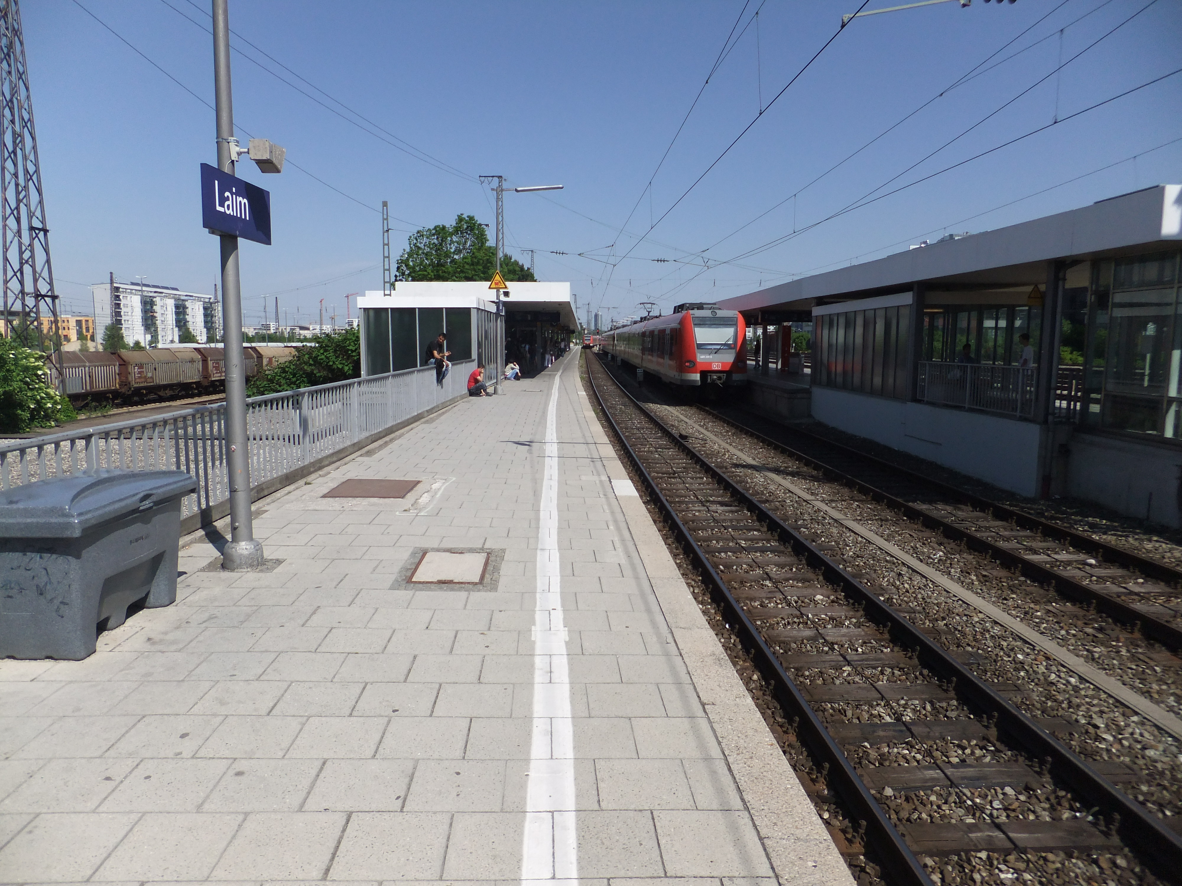 Bahnsteige des Bahnhofs München-Laim